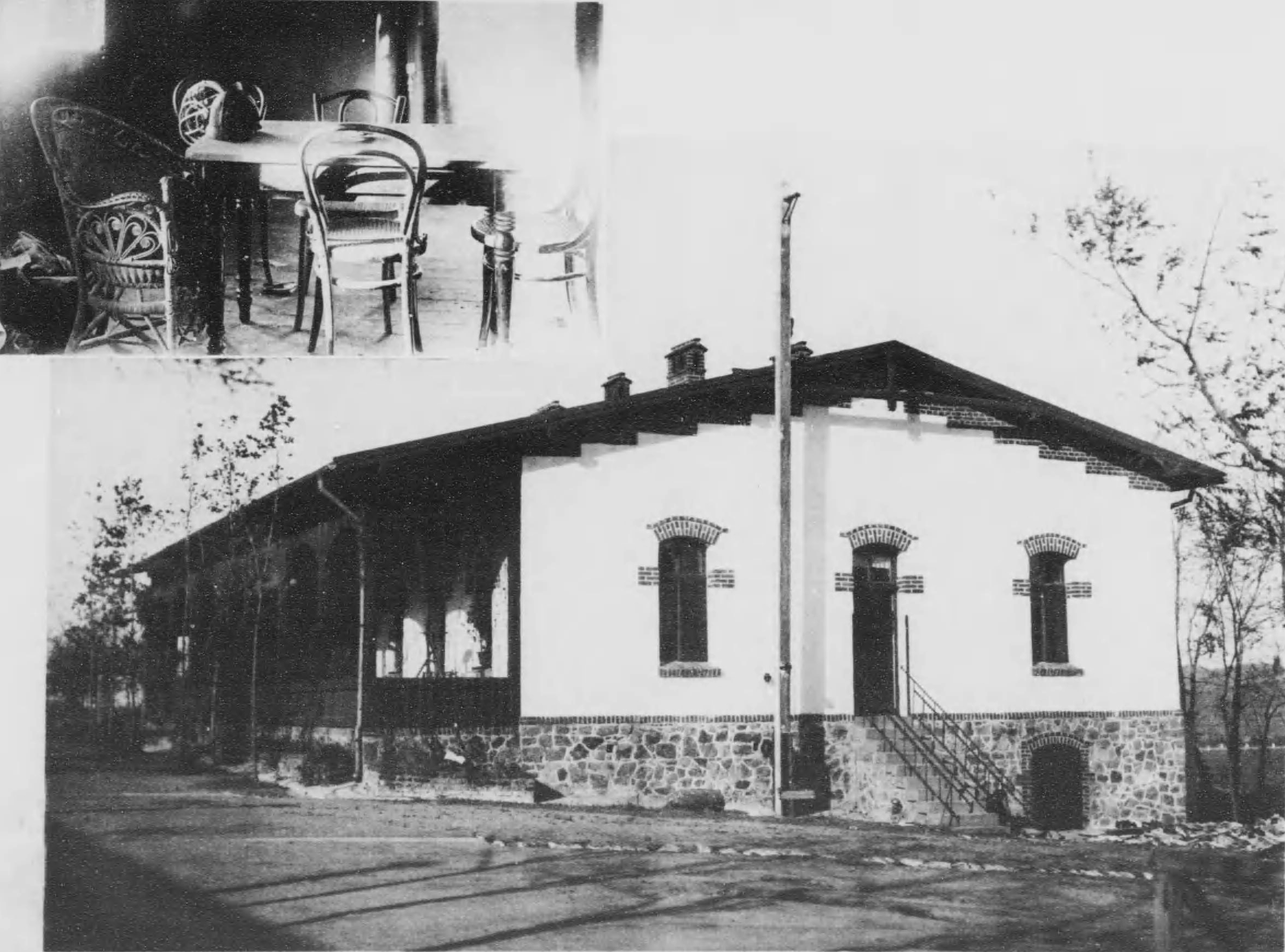 青岛战役日德双方司令官会面处